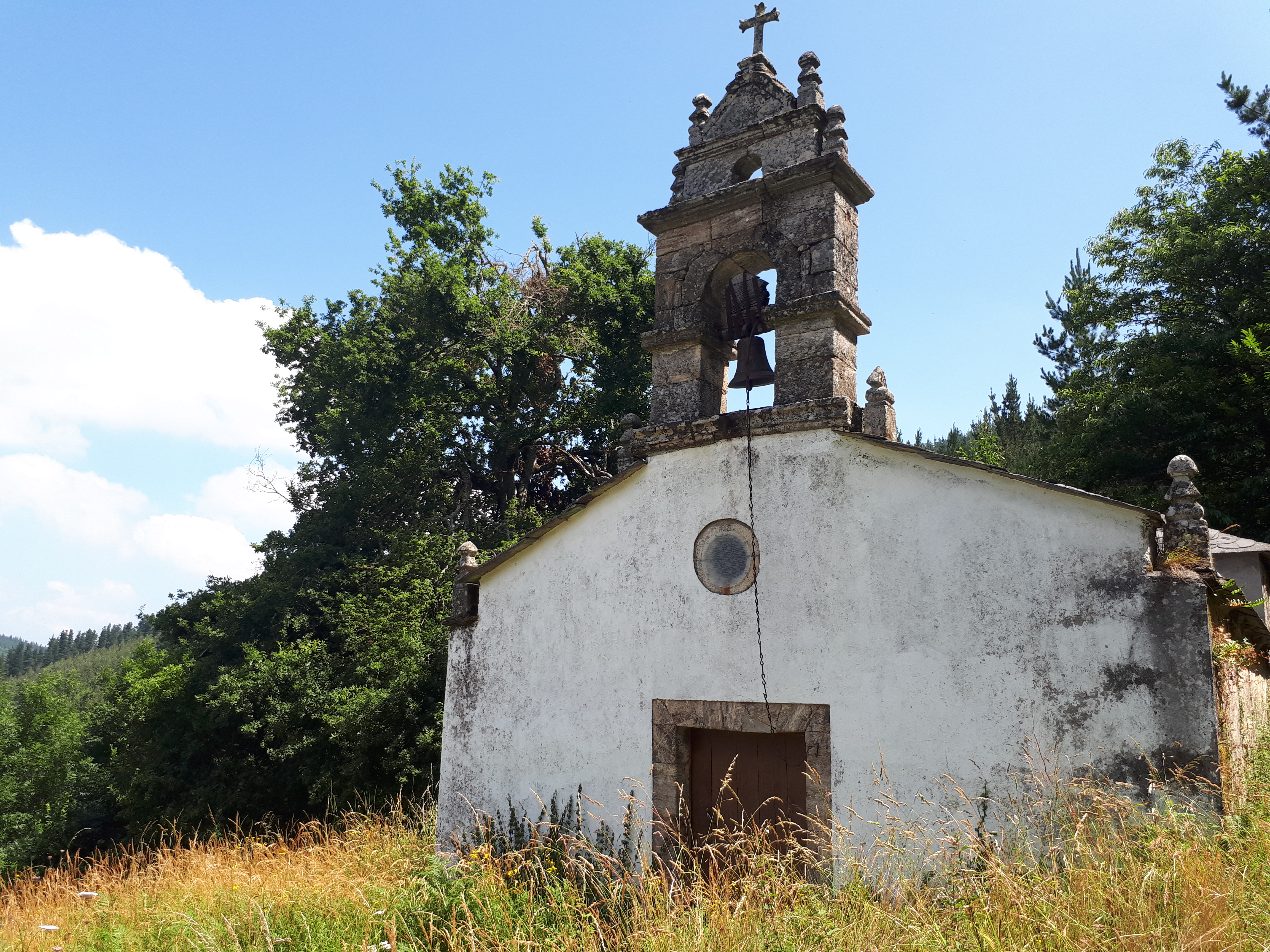 Igrexa de San Salvador de Francos